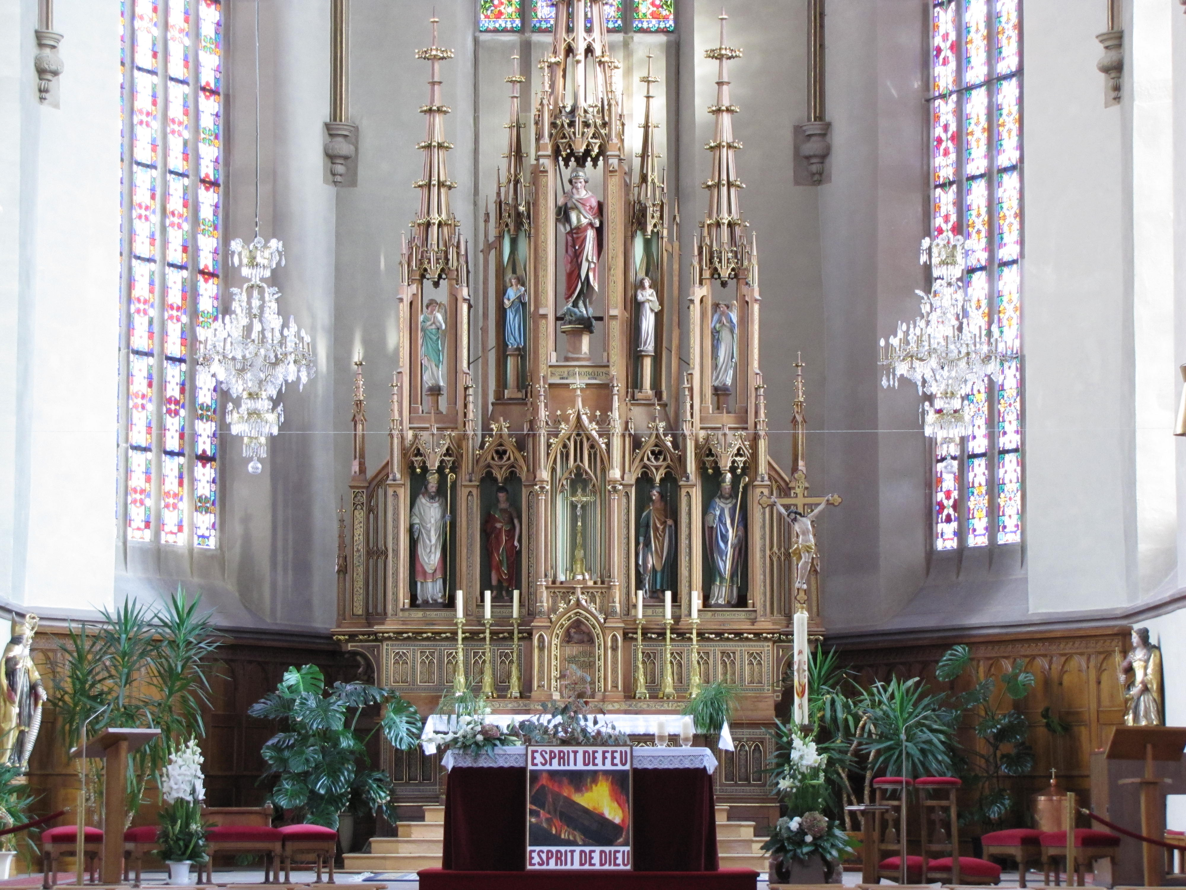 Alsace, Bas-Rhin, Église Saint-Georges de Molsheim, ancienne église des Jésuites (1618) (PA00084798, IA67006097). Maître-autel néo-gothique (1865)